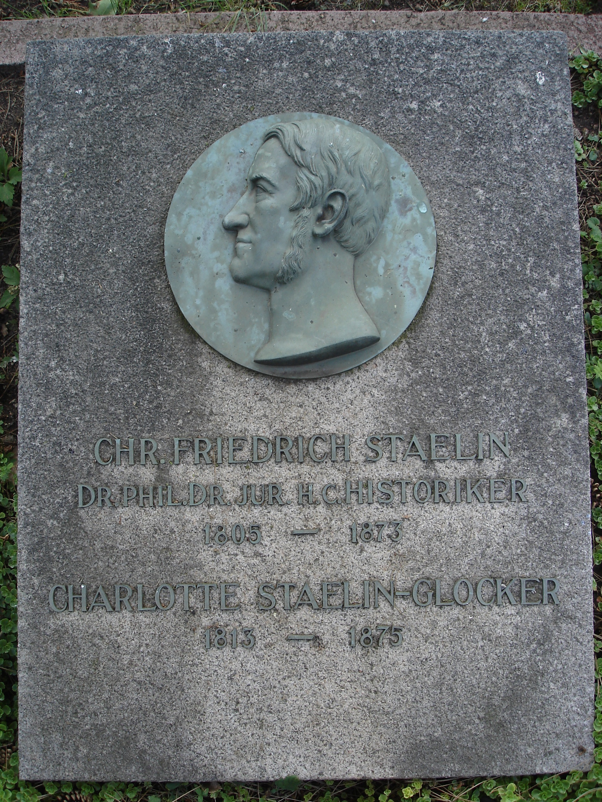 Grab des Historikers Christoph Friedrich Stälin auf dem Stuttgarter Prag-Friedhof